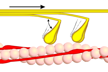 Beschreibung: Querbrückenzyklus Phase 2 - Myosinköpfchen (gelb) kippen und gleiten so am Aktin vorbei (rosa). ATP wird dabei zu ADP und Phosphor verstoffwechselt. Der angedeutete Winkel beträgt etwa 50°. Zeichner: Moralapostel Lizenzstatus: GNU FDL